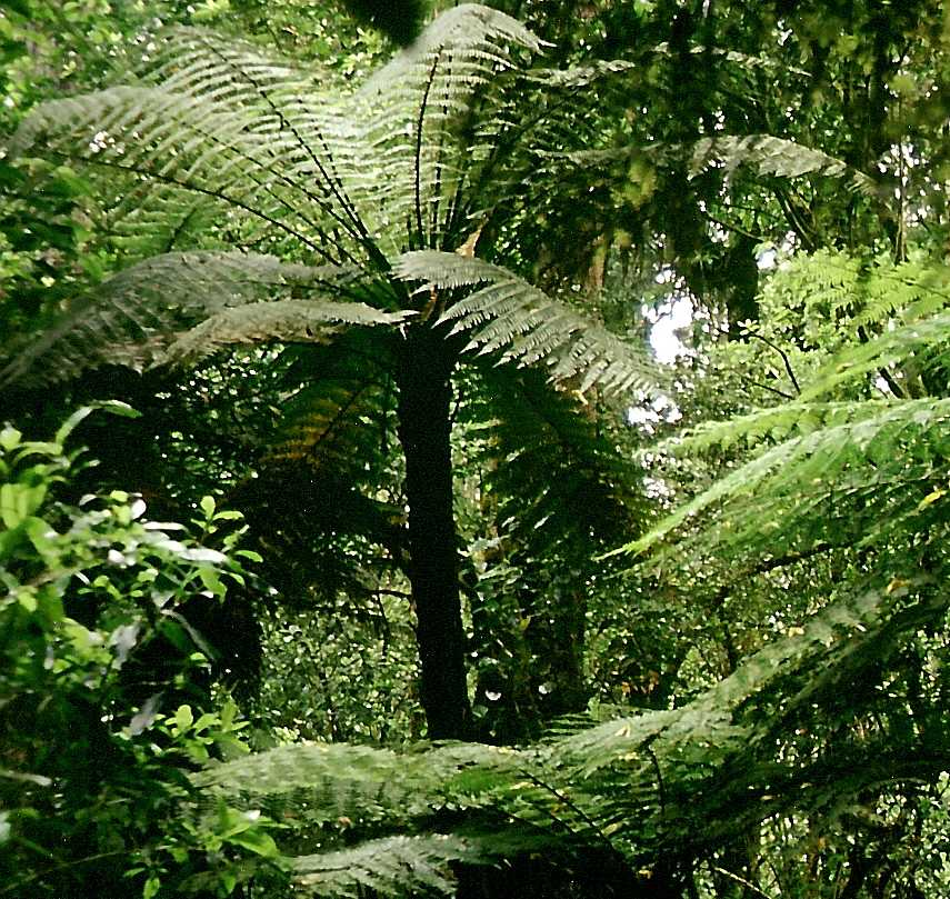 Baumfarne im Tongariro-Nationalpark, Neuseeland (Spezies?) Ort: Neuseeland, Nordinsel, Januar 1992